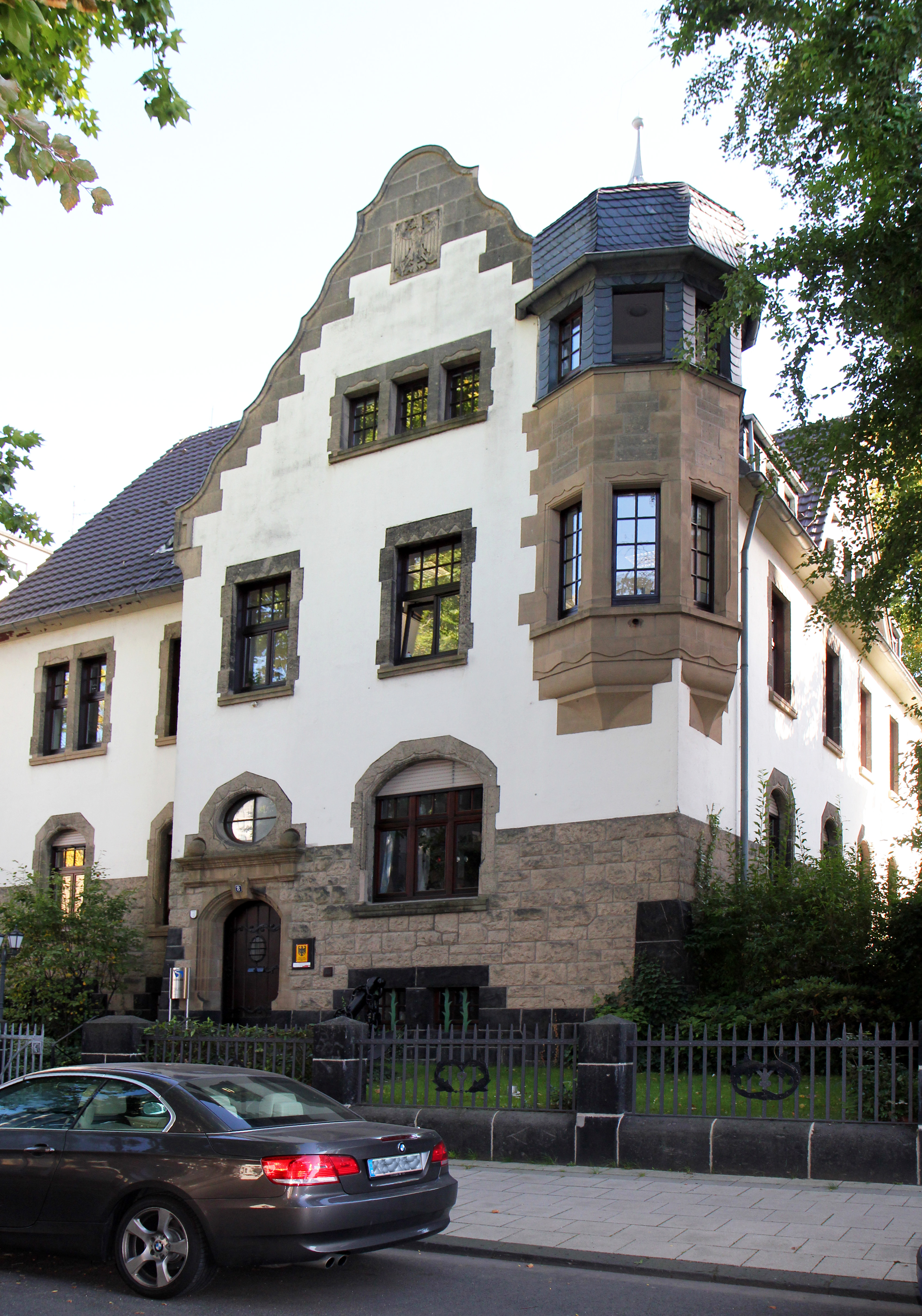 Köln Neustadt-Nord, An der Münze 8